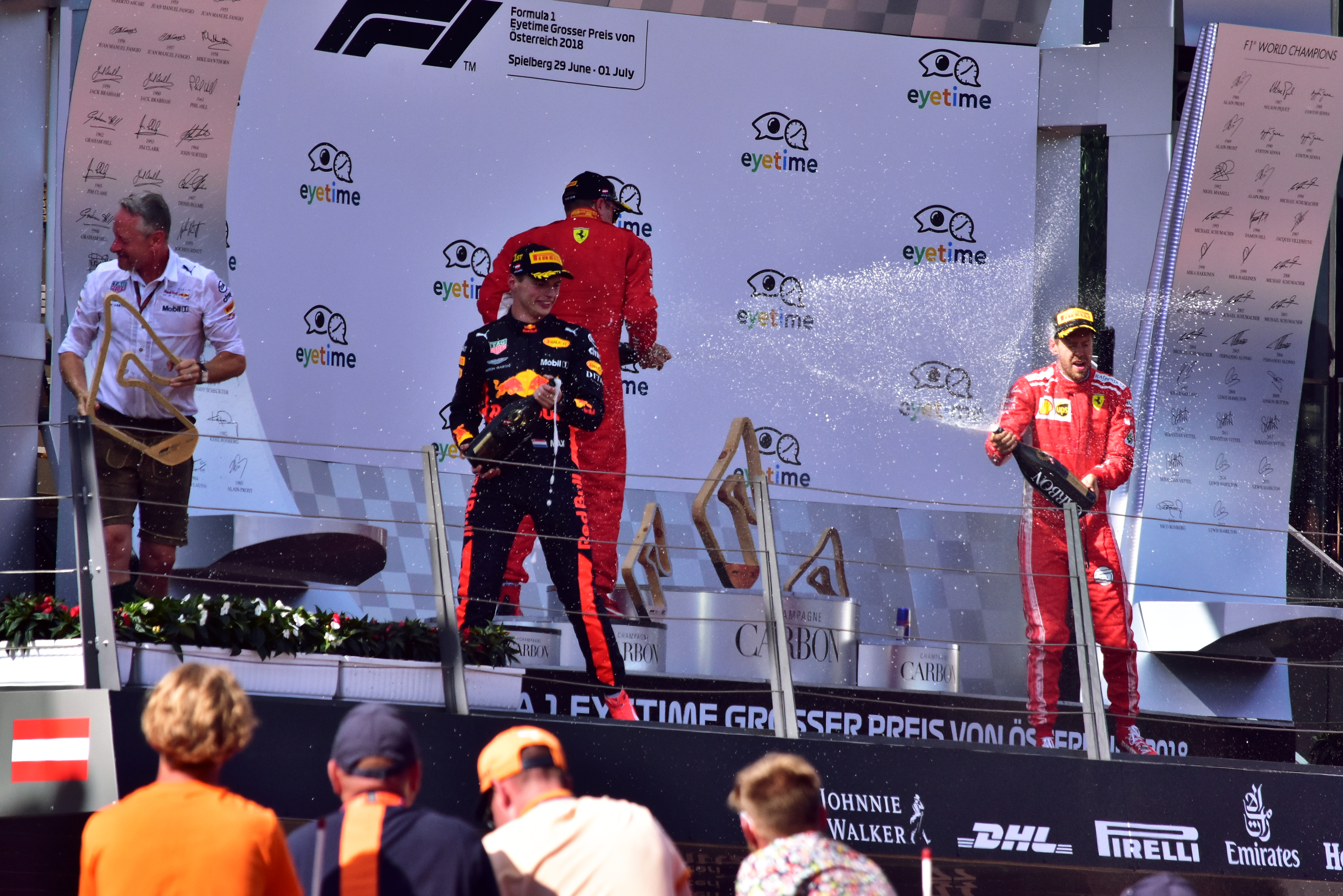 2018 Austrian Grand Prix.